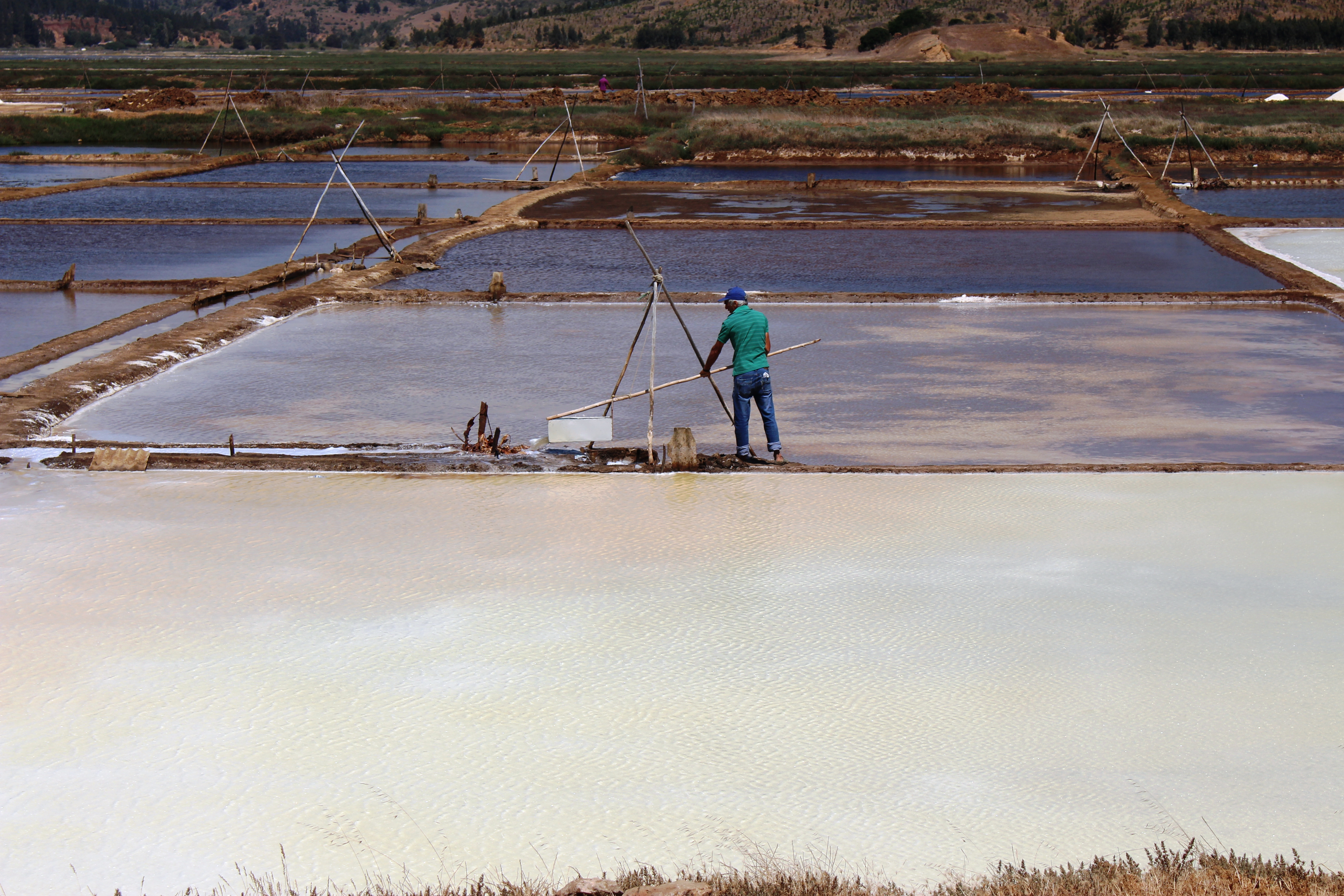 Salinas Lo Valdivia, comuna Paredones, Chile